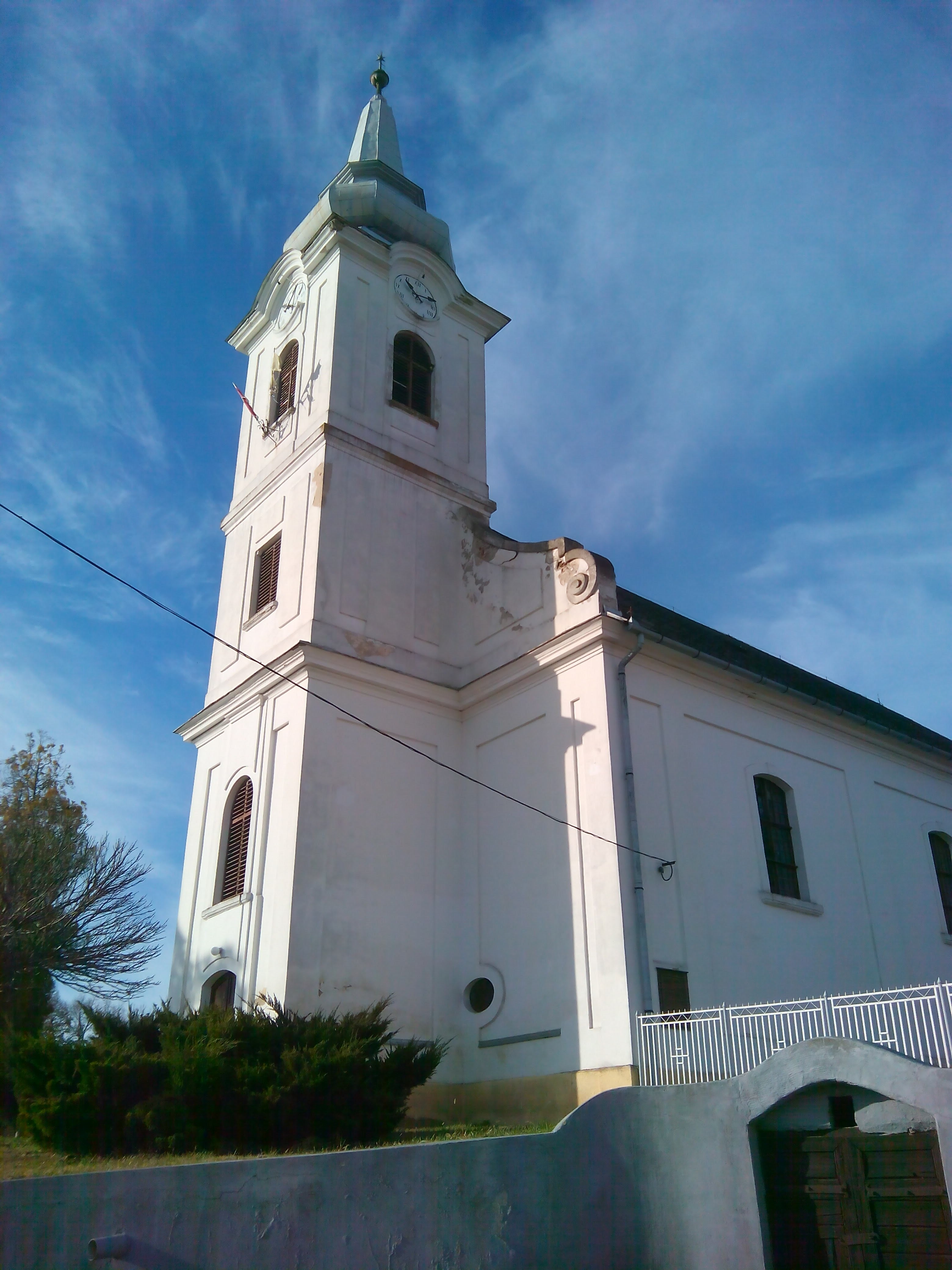 Pánd református templom